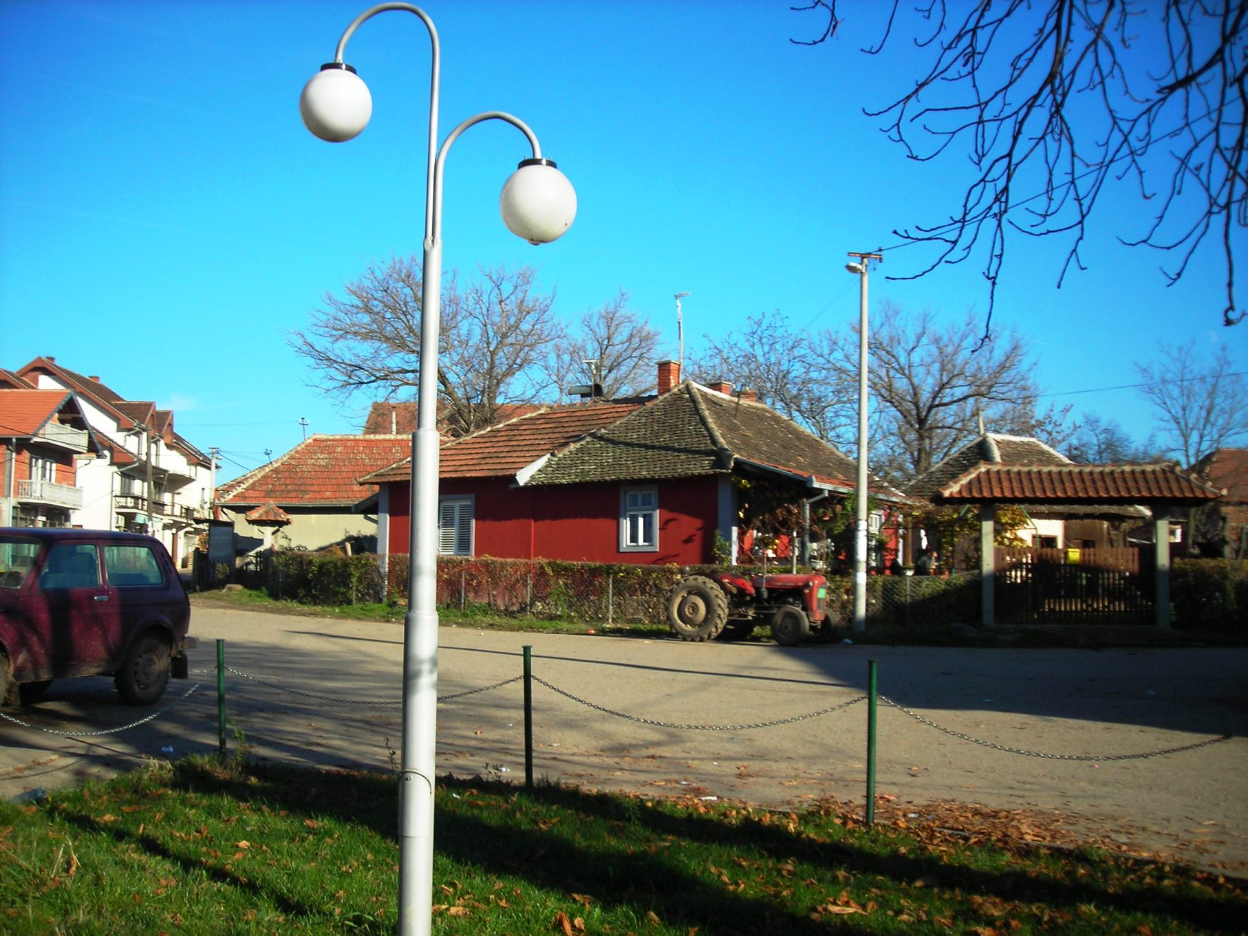 Средиште Витошевца - Vitoševac Centre}